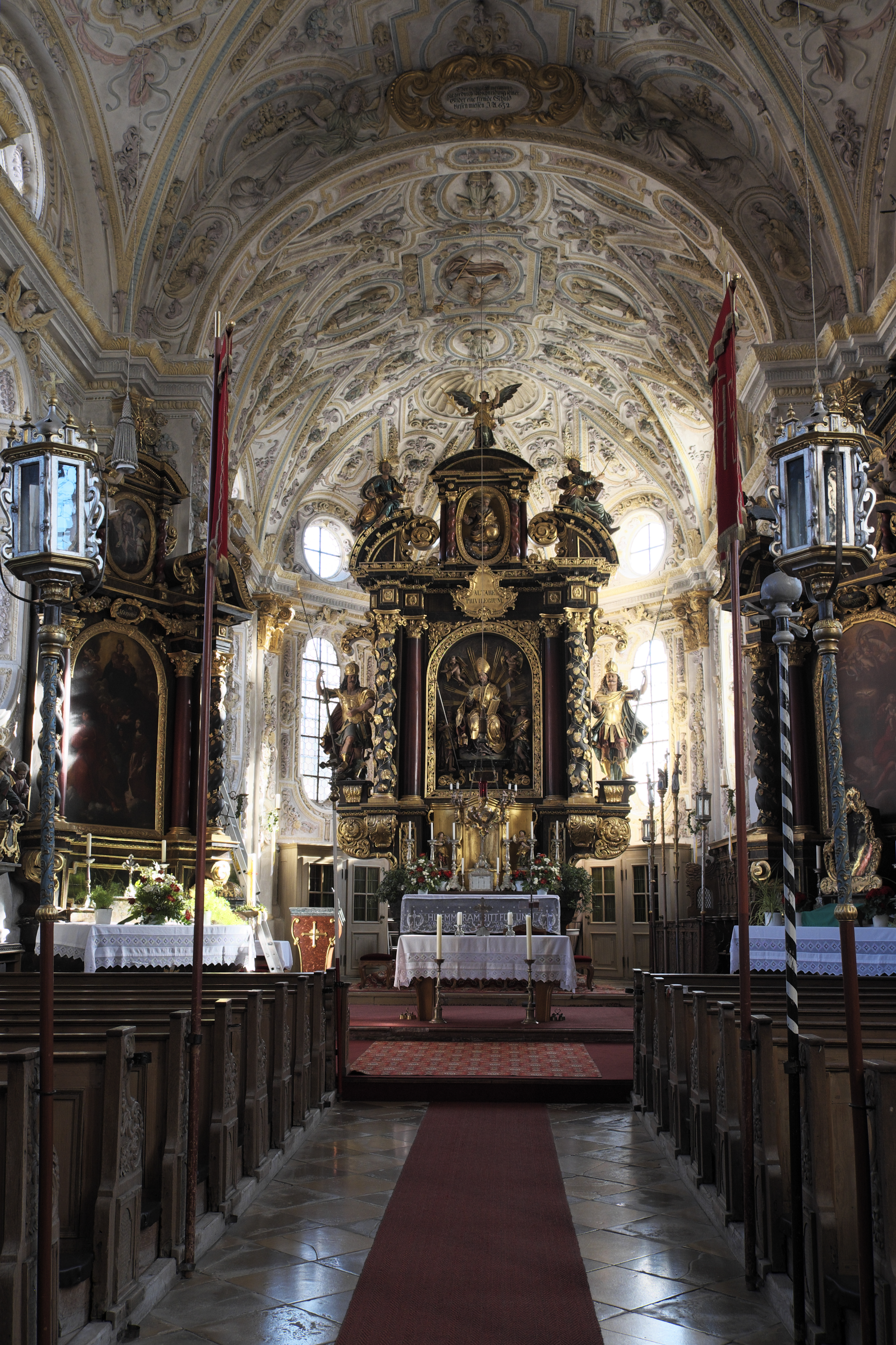 Katholische Pfarrkirche St. Emmeram in Kleinhelfendorf (Aying) im Landkreis München (Bayern/Deutschland), Innenraum